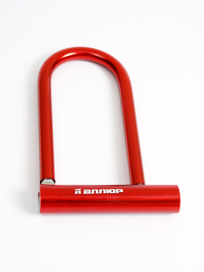 Велосипедный замок Аллюр VS-130U